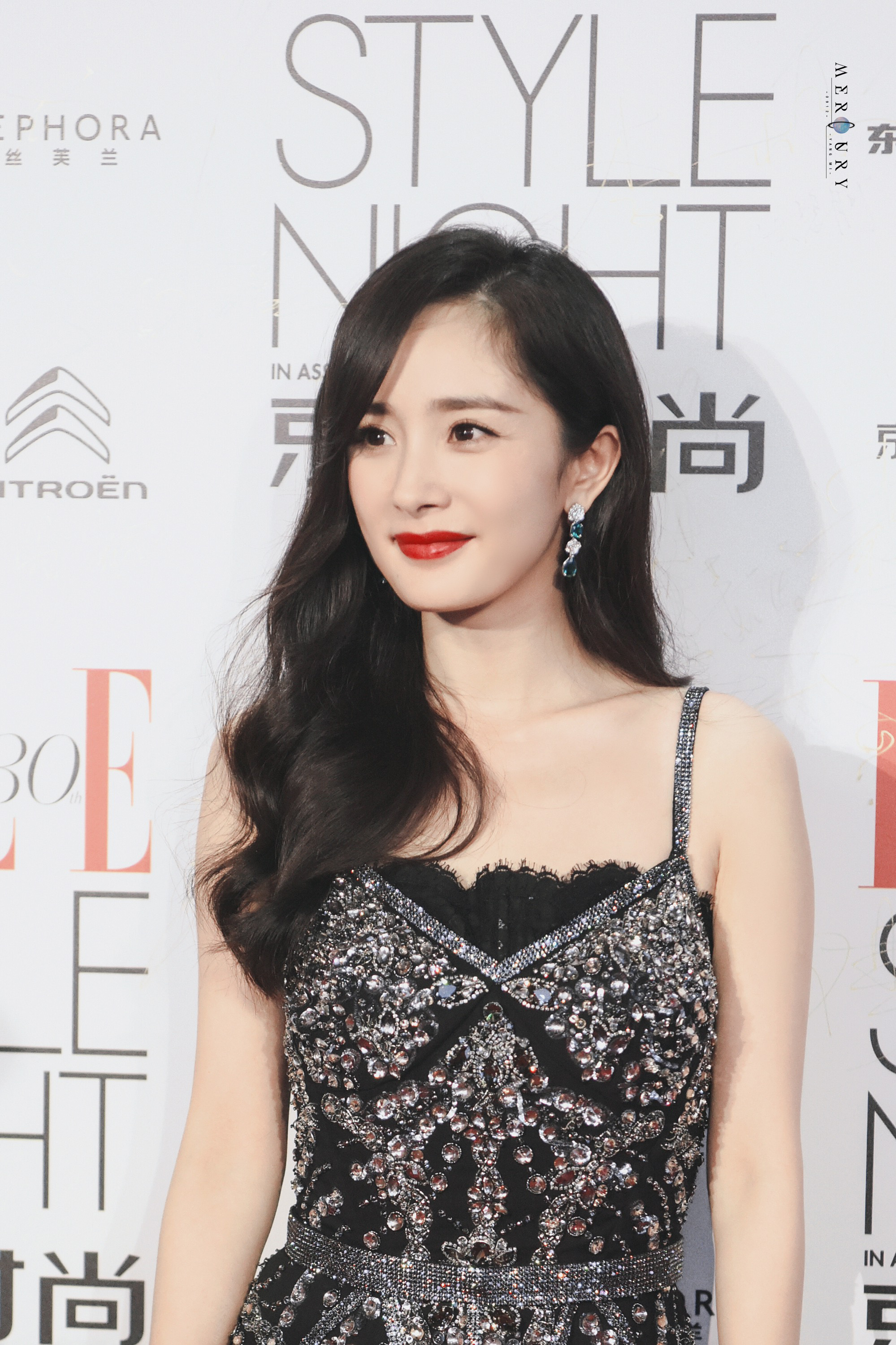 中文（中国大陆）: 2018年9月6日，杨幂出席ELLE30周年风尚大典